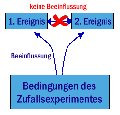 Beeinflussung von Ereignissen bei einem Zufallsexperiment (Beschriftung deutsch).